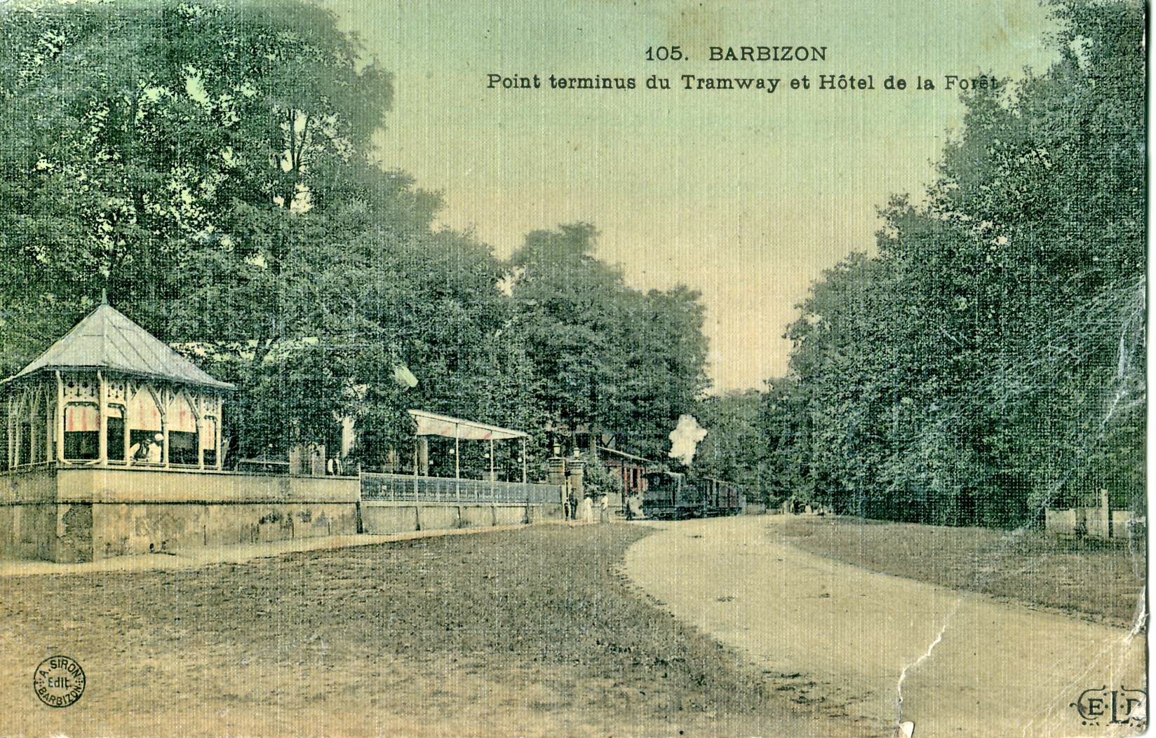 Carte postale ancienne éditée par ELD, N°105 BARBIZON : Point terminus du tramway et Hôtel de la Forêt Tramway Sud de Seine et Marne (TSSM) : la ligne Gare de Melun - Barbizon ouvrit le 27 mars 1899 et fut prolongée à Milly-la-Forêt le 1er avril 1910